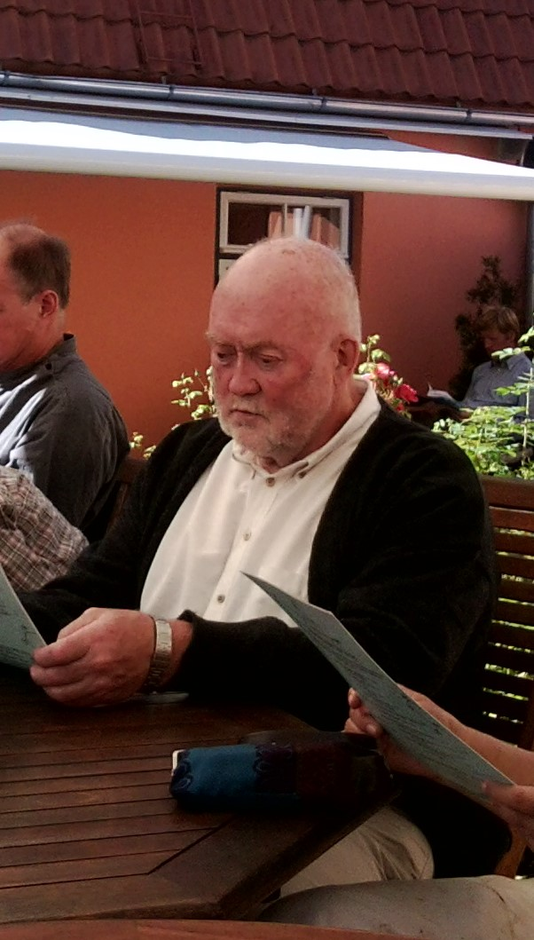 Rein Siim 2012. aastal Haapsalus